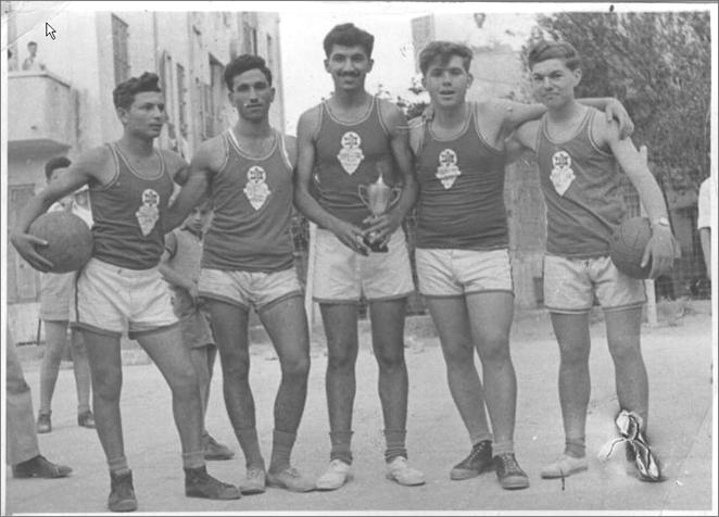 תמונה מארכיון של מנחם שירזי